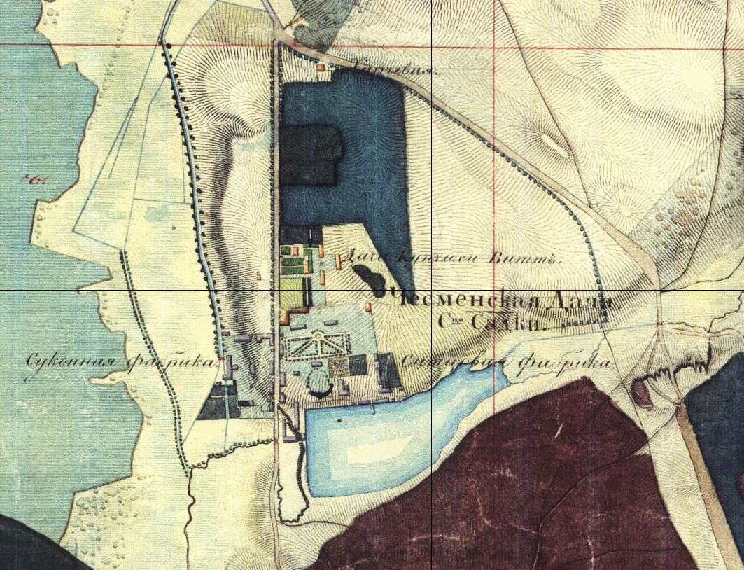 Фрагмент карты Москвы. Дача Чесменского. м. Текстильщики